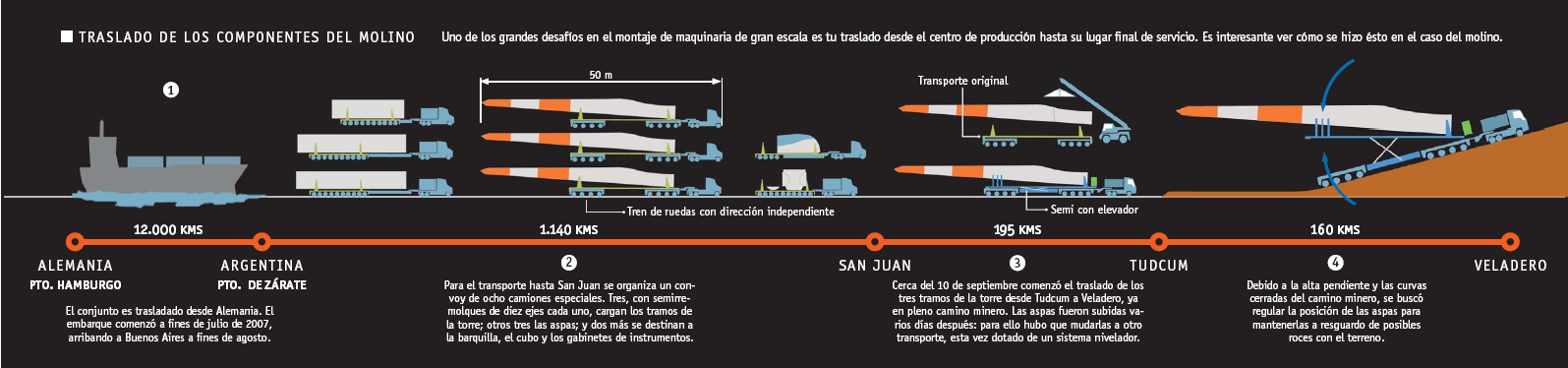 Infografía del translado del aerogenerador de Veladero